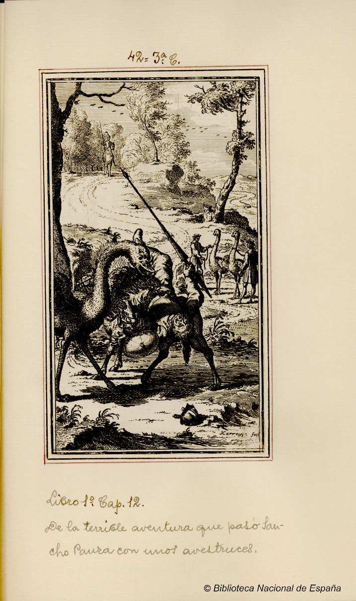 Aventura de Sancho Panza con unas avestruces. Ilustración de la Histoire de l'admirable don Quixotte de la Manche, Bruselas, Guillaume Fricx ¿1706? y 1713 Hilaire Foucoult. Edición de la traducción francesa atribuida a Filleau de Saint Martin, que añadió 32 nuevos capítulos al Quijote cervantino con nuevas aventuras, entre ellas la de la imagen